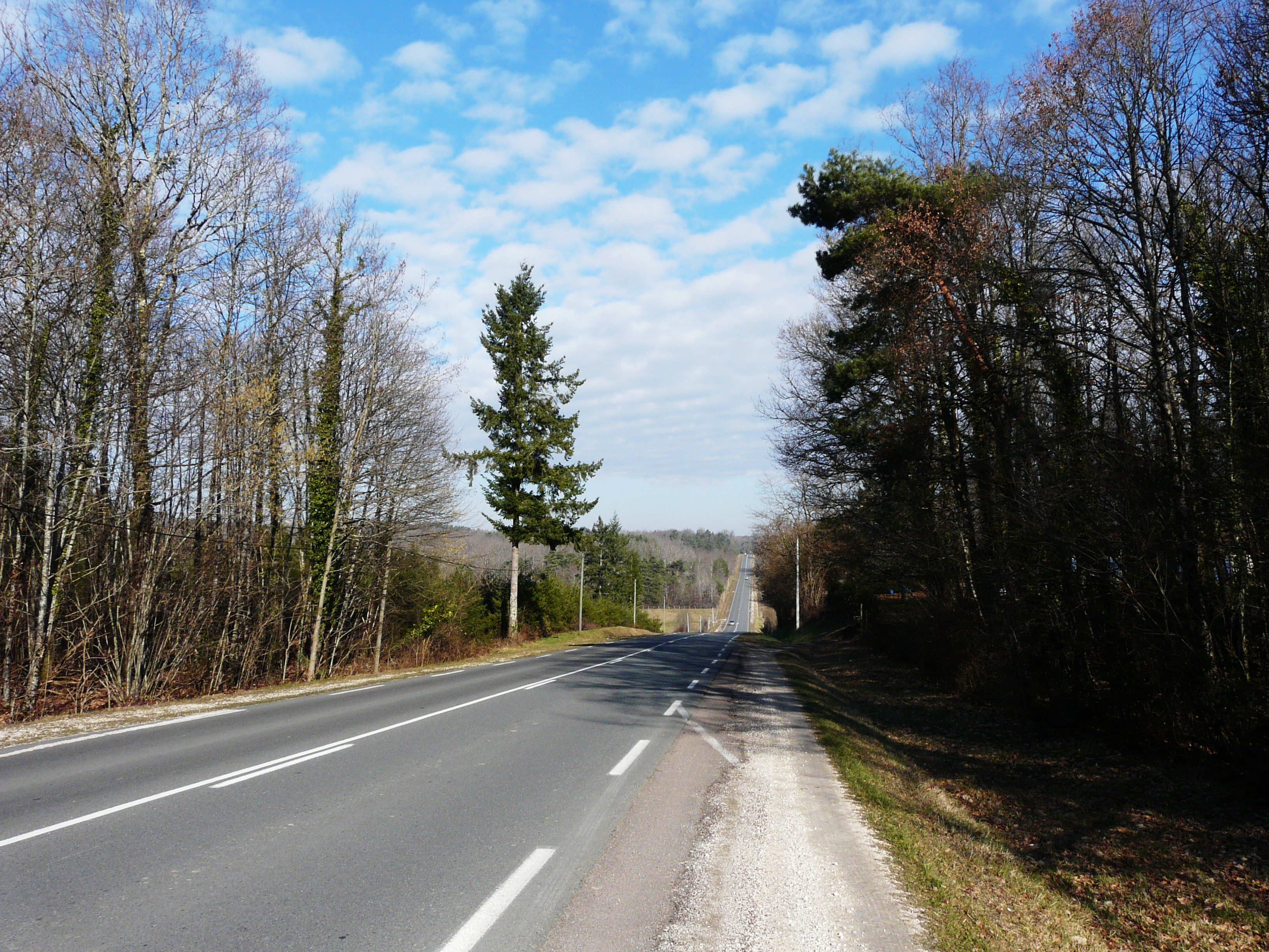 La route départementale 675 (ancienne route nationale 675) dans sa traversée de la commune de Sceau-Saint-Angel. Vue prise entre Tourbanier et Morelière, en direction du nord, vers le Pouyaud.